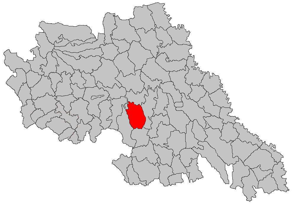 Categorie:Hărţi ale judeţului Iaşi